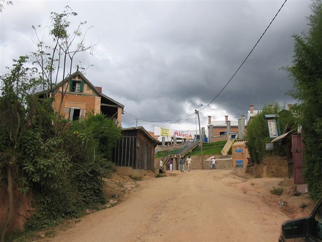 route d'Anjozorobe en direction d' Anosivolakely